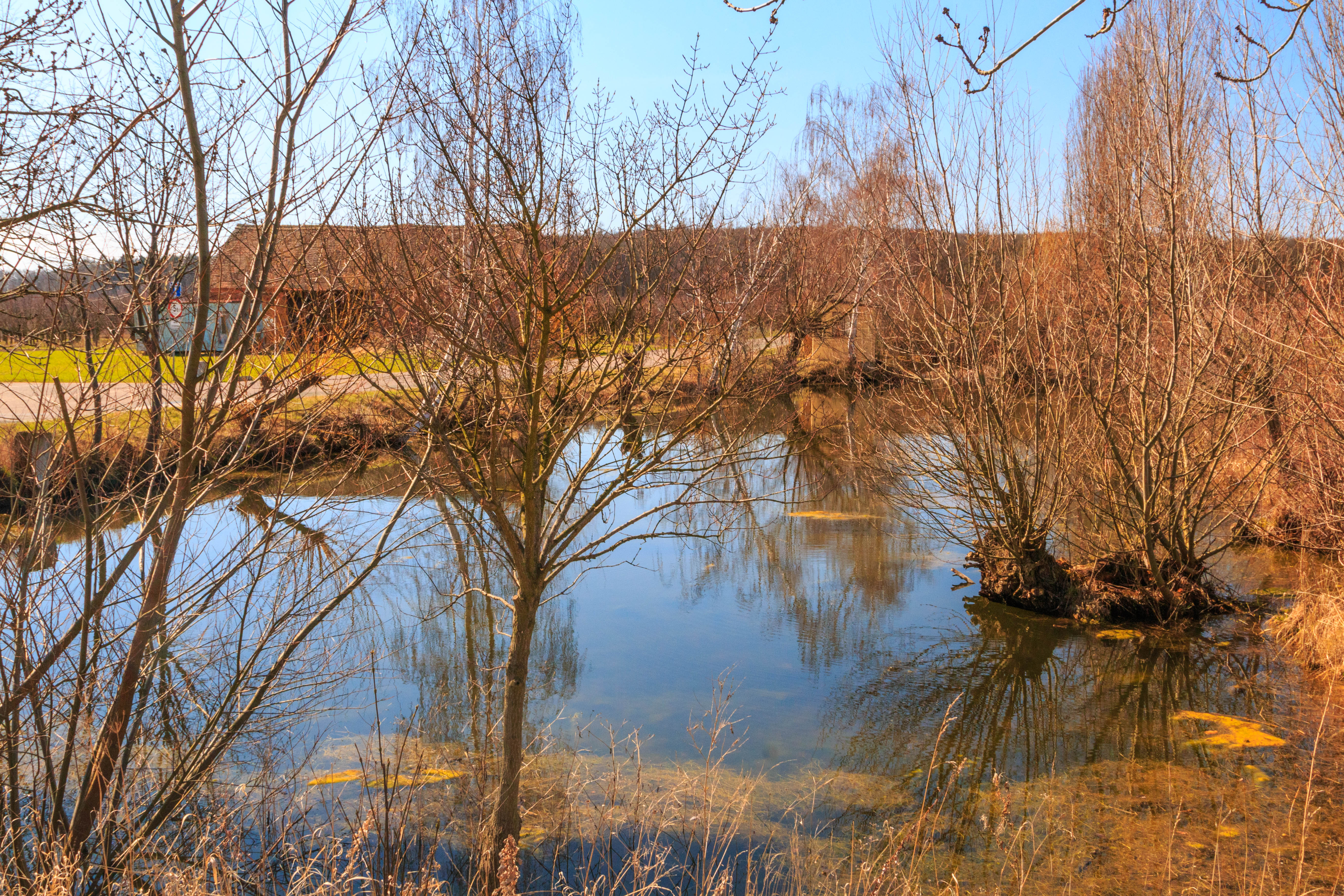 Písník u obce Želí v okrese Hradec Králové Project: Vodstvo.